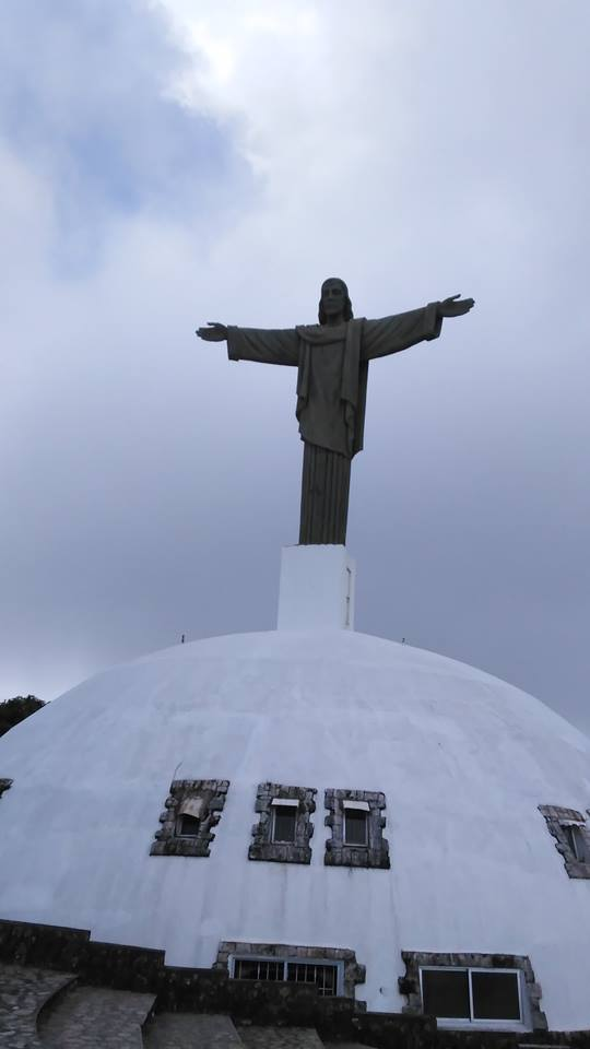 Cristo Redentor